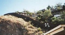 Nogales, Arizona